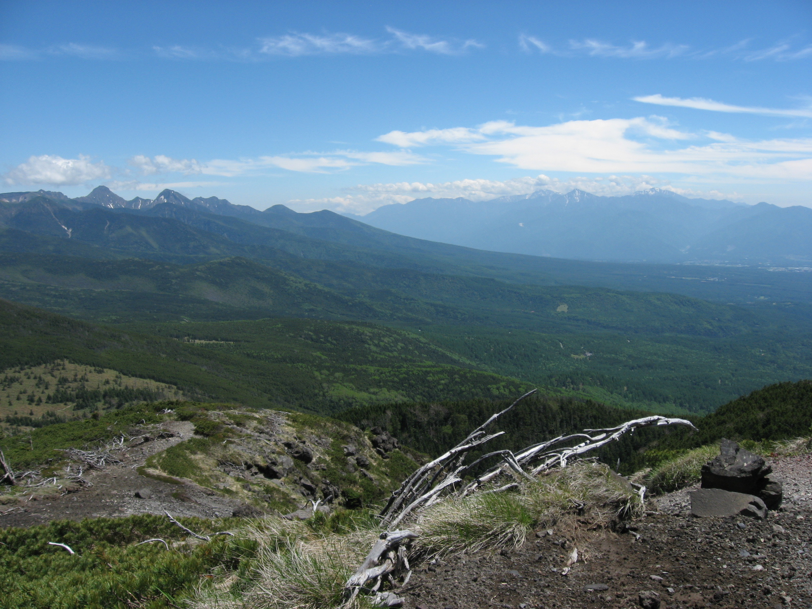 北横岳より蓼科高原